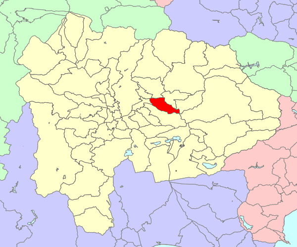 山梨県東八代郡一宮町の位置画像。